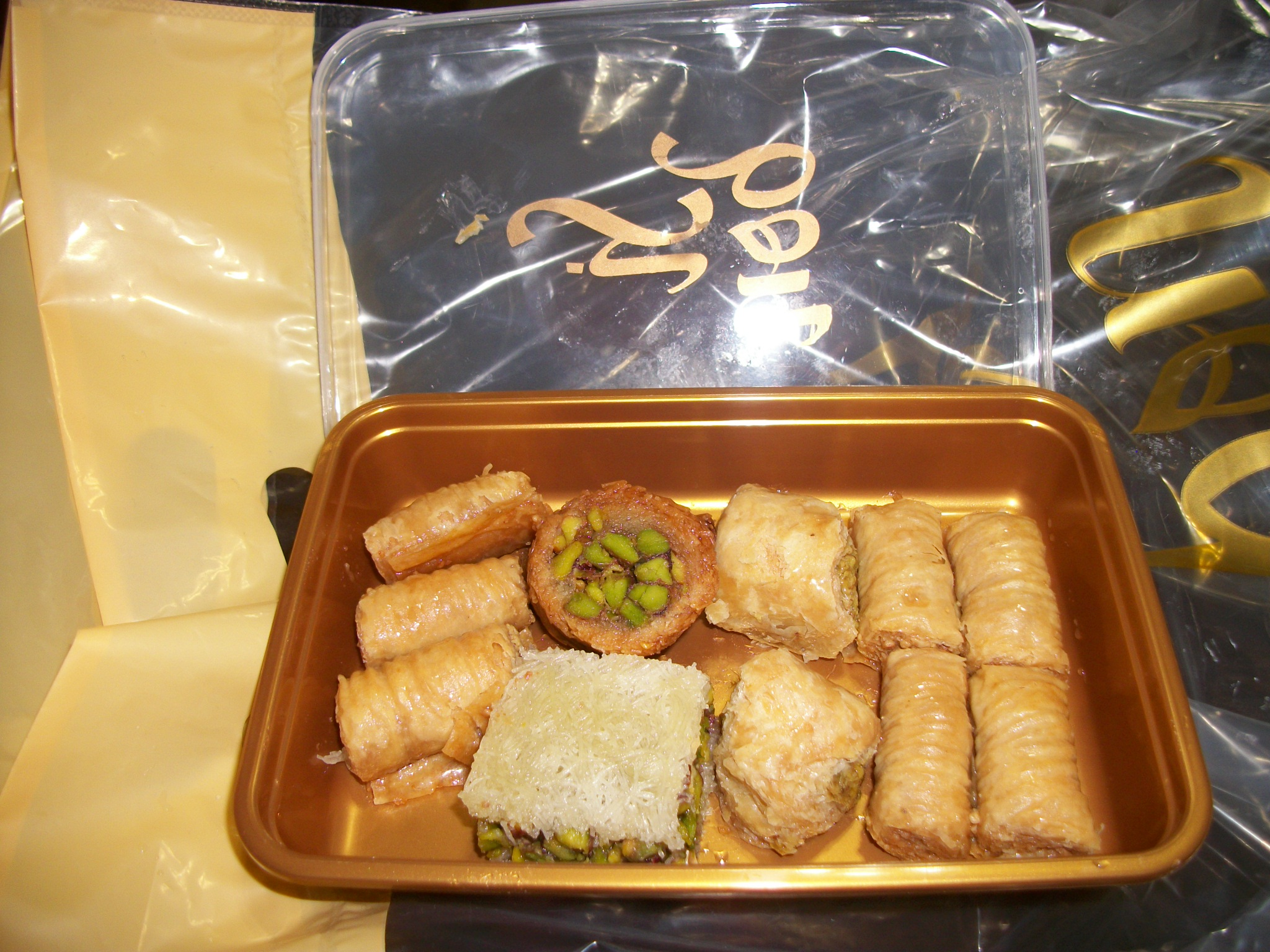 Différents types de Baklava acheté dans la Boulangeries-pâtisserie SiBon à Dekouané - Beyrouth